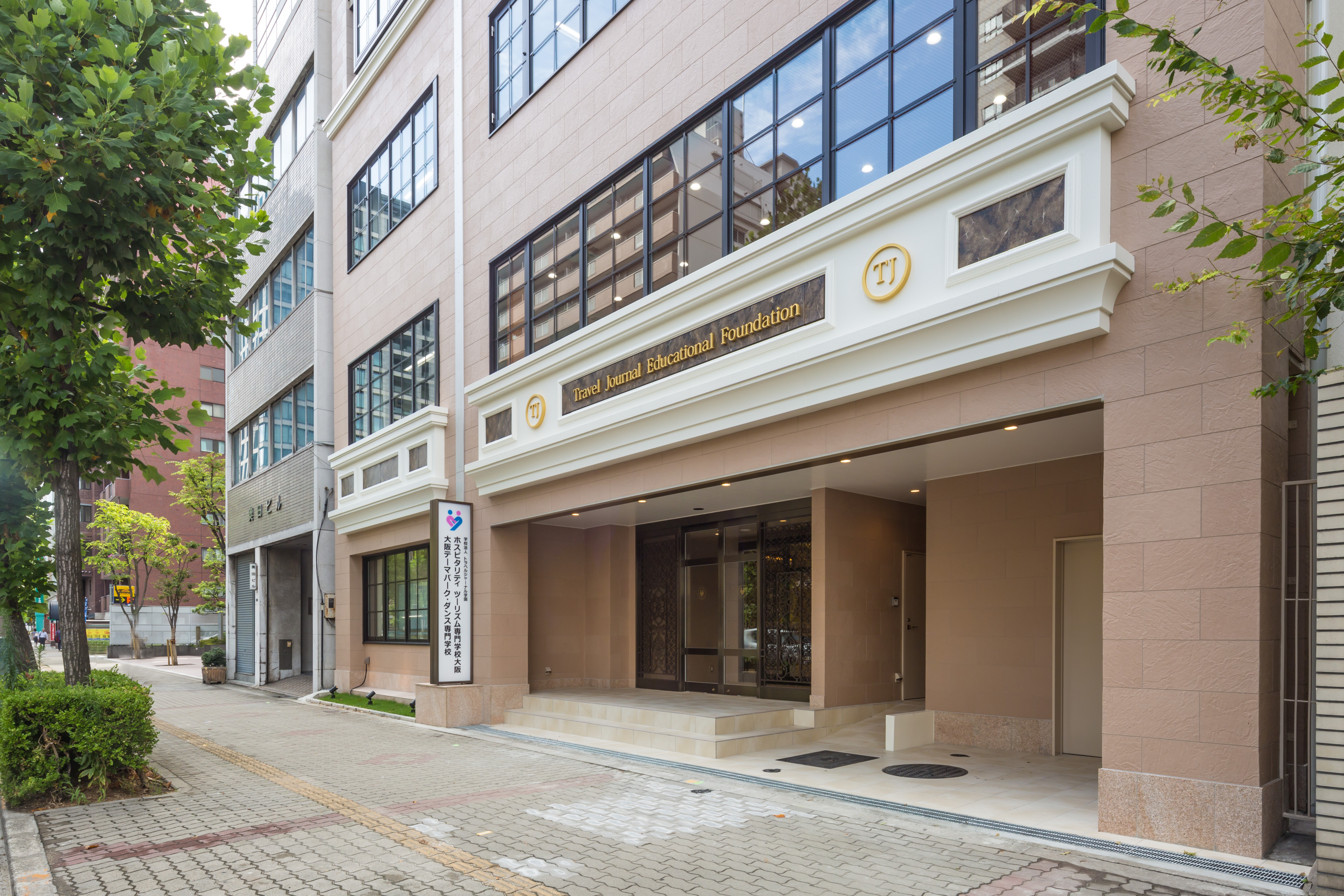 ホスピタリティ ツーリズム専門学校大阪 外観